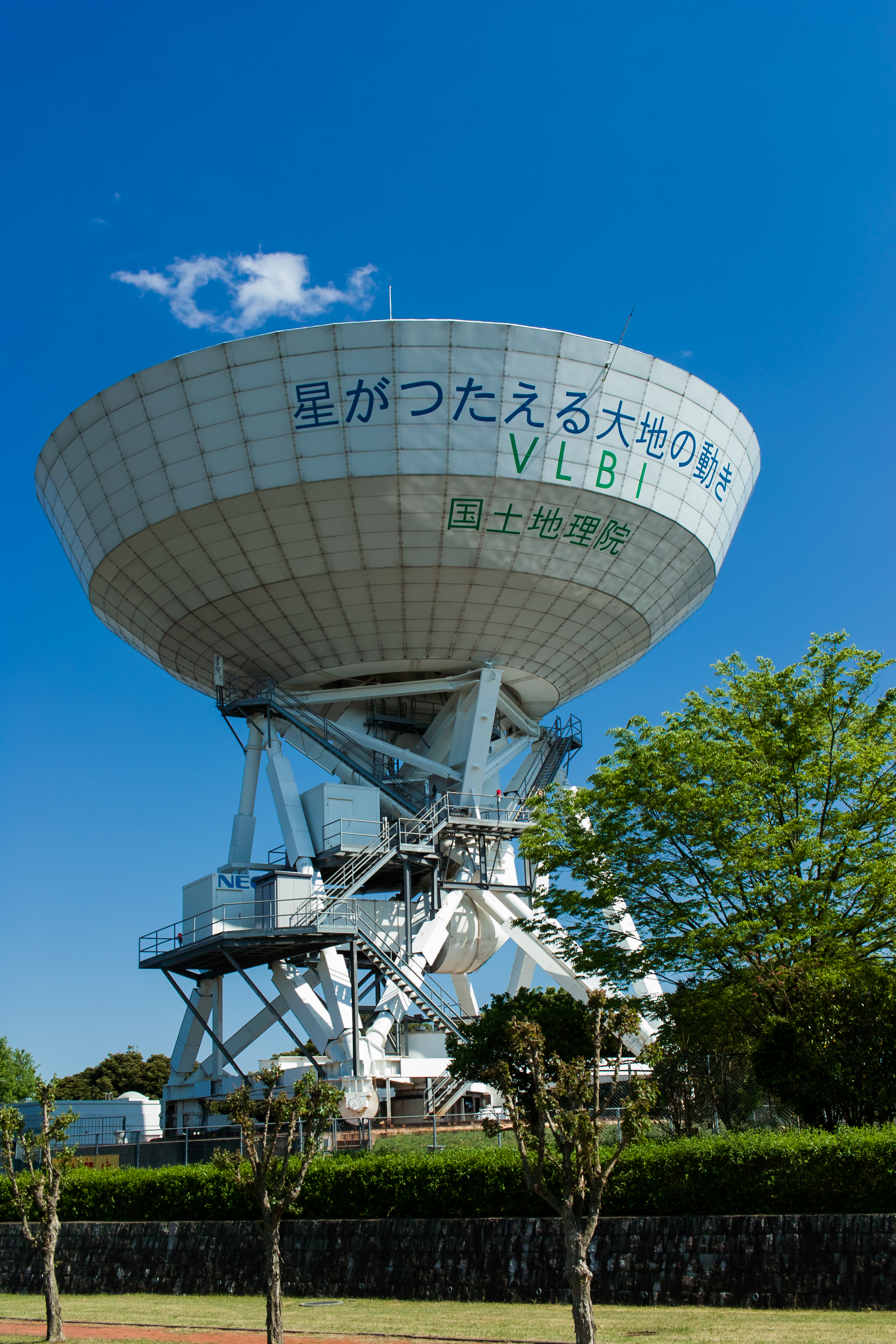 国土地理院にあるVLBIアンテナ。所在地は茨城県つくば市